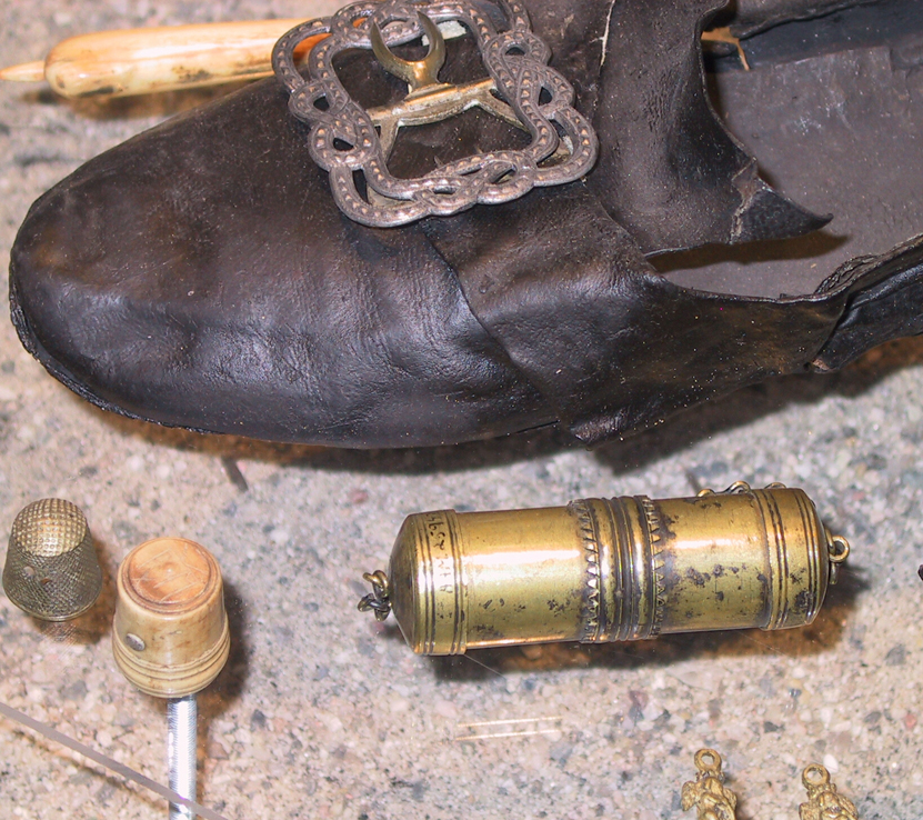 Fra Fredensborgutstillingen på Aust-Agder kulturhistoriske senter, Arendal. Fra vrakfunnet: Bl.a. sko, skospenne og fyrtøy av messing.